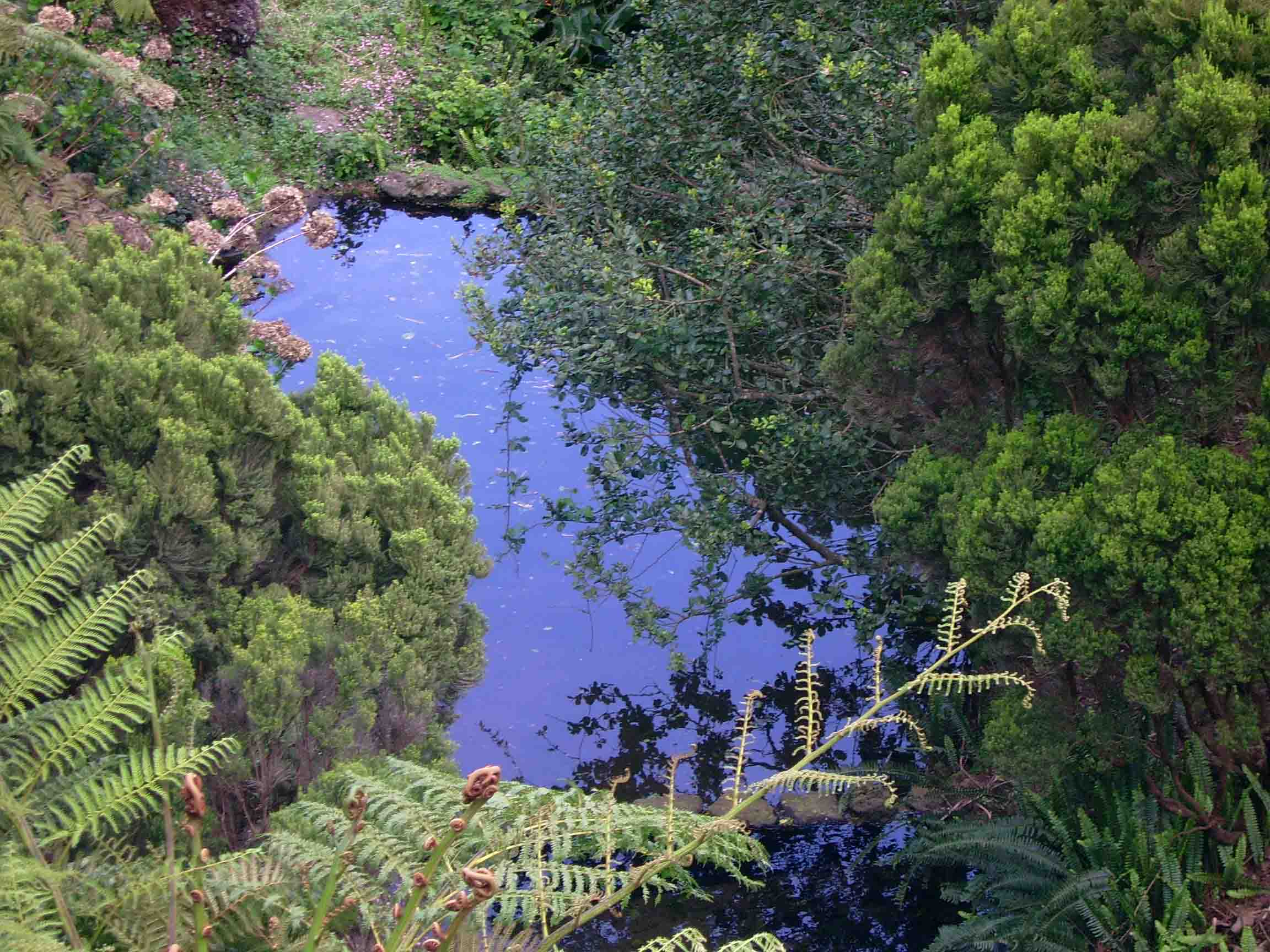 Vegetação endémica da Macarónesia no Parque Florestal das Sete Fontes, ilha de São Jorge, Açores, Portugal